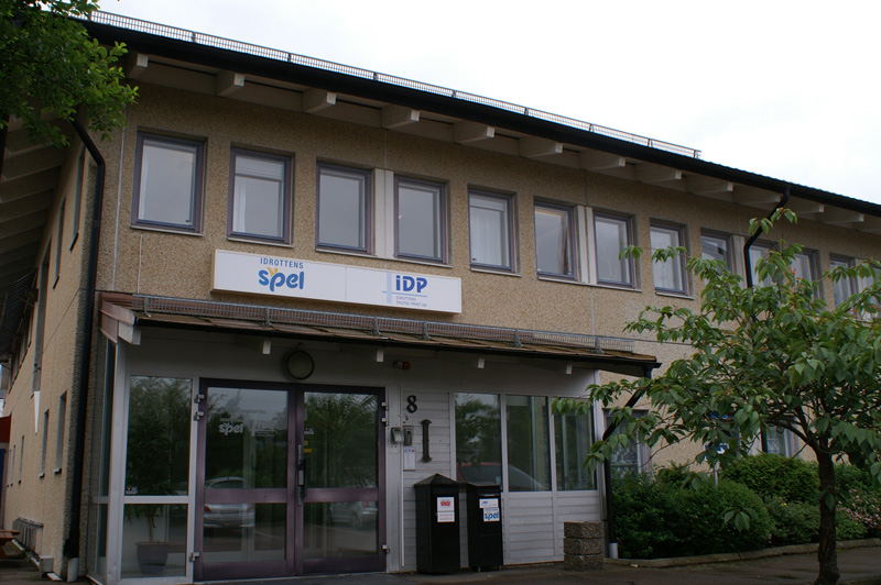 Idrottens Spels huvudkontor